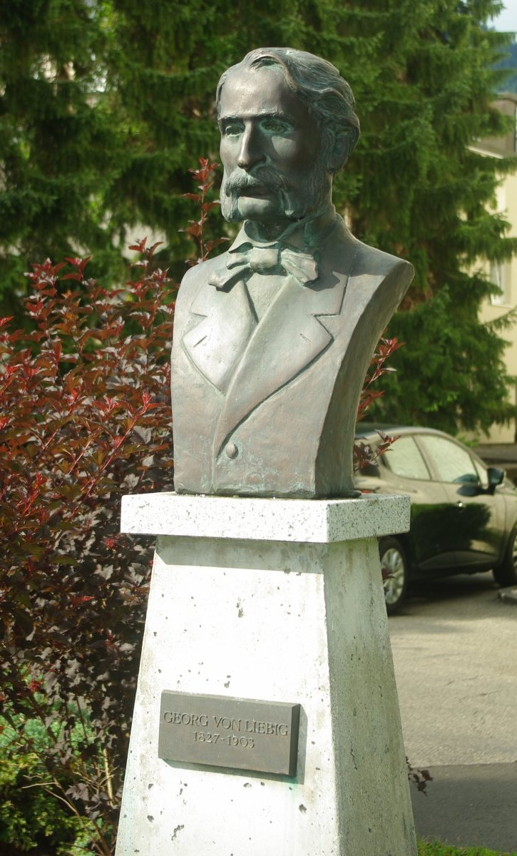 Büste von Georg von Liebig vor der Salus-Klinik in der Rinckstraße in Bad Reichenhall